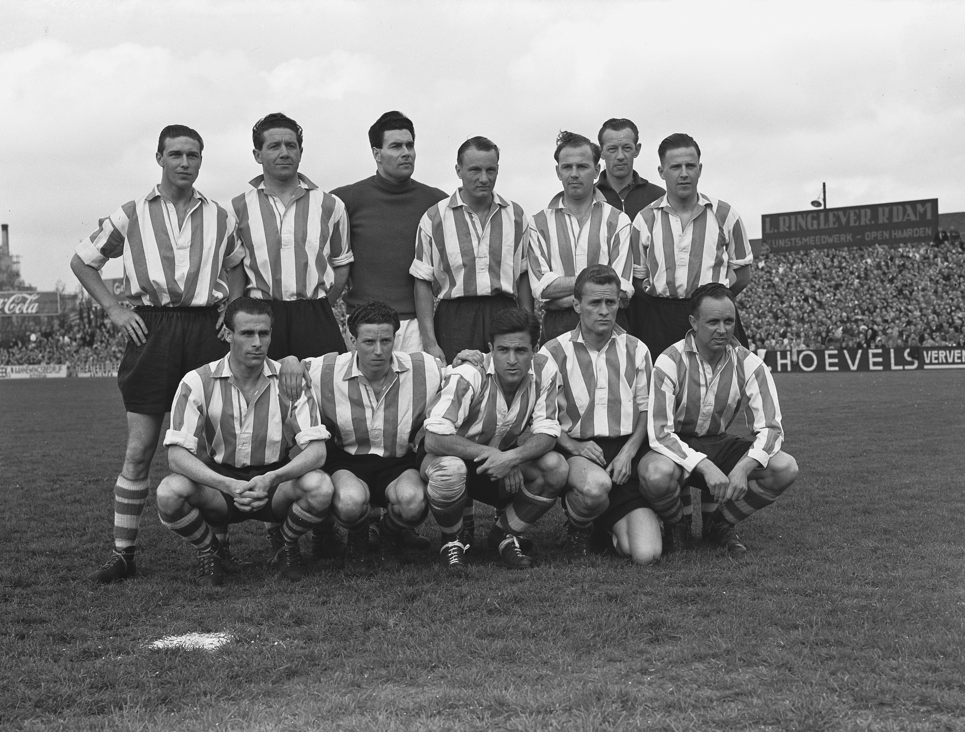 Collectie / Archief : Fotocollectie Anefo Reportage / Serie : [ onbekend ] Beschrijving : Sparta tegen HBS 4-1 Sparta-elftal staand v.l.n.r. Verbee Terlouw Landman Tilbont Sonneveld Wenneker zittend v.l.n. Van Ede Terlaak Oerlemans Benningshof Borraui / Datum : 20 april 1952 Trefwoorden : sport, voetbal Instellingsnaam : HBS Fotograaf : Pot, Harry / Anefo Auteursrechthebbende : Nationaal Archief Materiaalsoort : Glasnegatief Nummer archiefinventaris : bekijk toegang 2.24.01.09 Bestanddeelnummer : 905-0677 Reacties Geplaatst door Anoniem op 15 mei 2011 - 20:47. verbee m.z. verbeek tilbont m.z. tiebout borraui m.z. borani m.vr.groeten